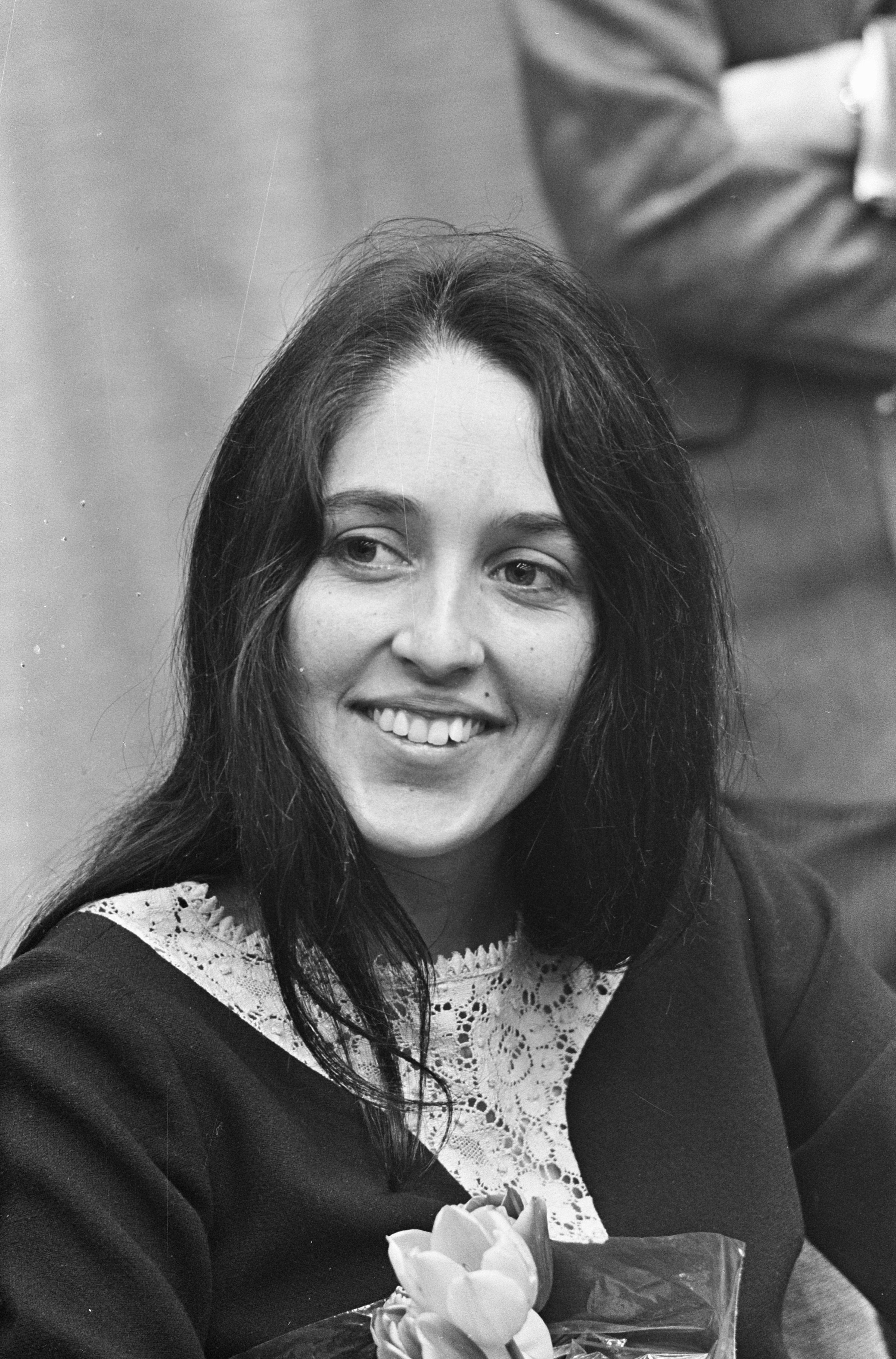 Collectie / Archief : Fotocollectie Anefo Reportage / Serie : [ onbekend ] Beschrijving : Joan Baez , Amerikaanse zangeres tijdens persconferentie Datum : 26 april 1966 Locatie : Noord-Holland, Schiphol Trefwoorden : musici, portretten, zangeressen Persoonsnaam : Joan Baez Fotograaf : Kroon, Ron / Anefo Auteursrechthebbende : Nationaal Archief Materiaalsoort : Negatief (zwart/wit) Nummer archiefinventaris : bekijk toegang 2.24.01.05 Bestanddeelnummer : 919-0773